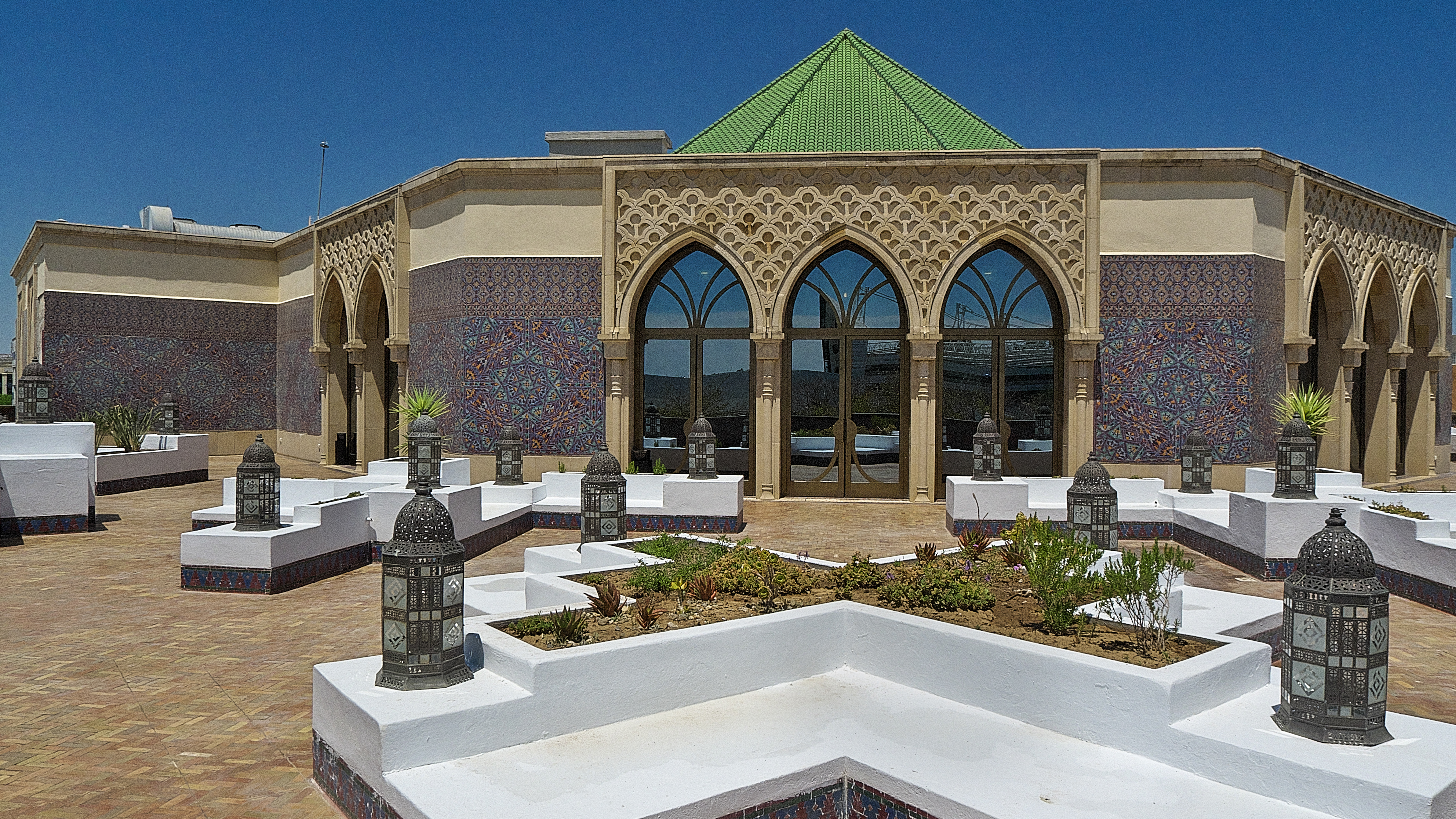 Indudablente, entre las grades obras de Michel Pinseau. Sevilla 1992